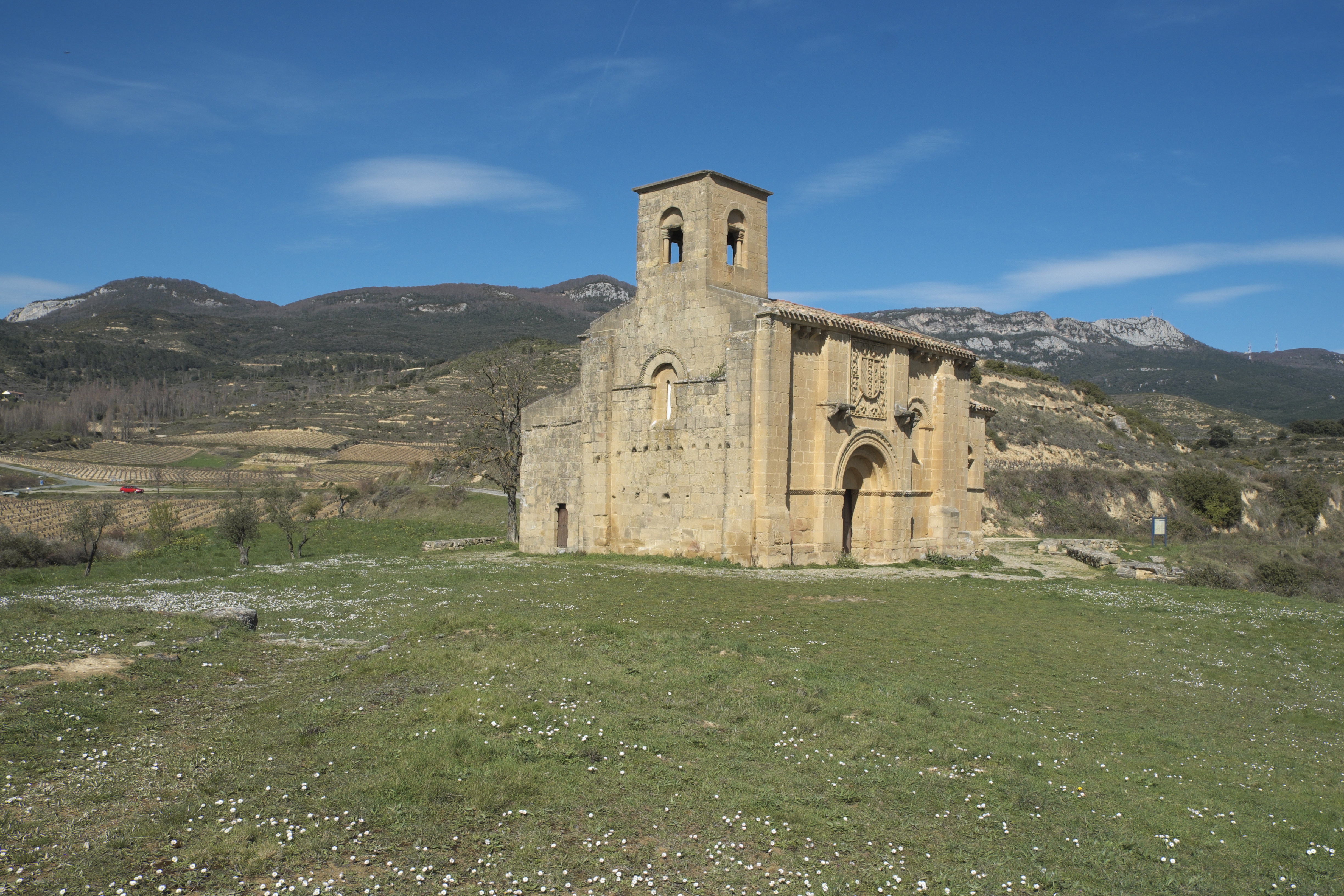 Kapelle Santa María de La Piscina in Peciña in der spanischen autonomen Gemeinschaft La Rioja